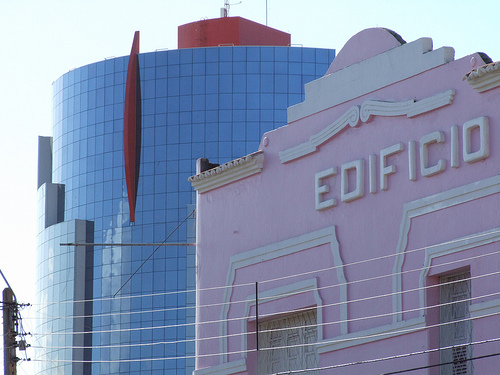 Edíficio Caiçara ao fundo e Edíficio Mar em destaque na foto. Mossoró / RN / Brasil.